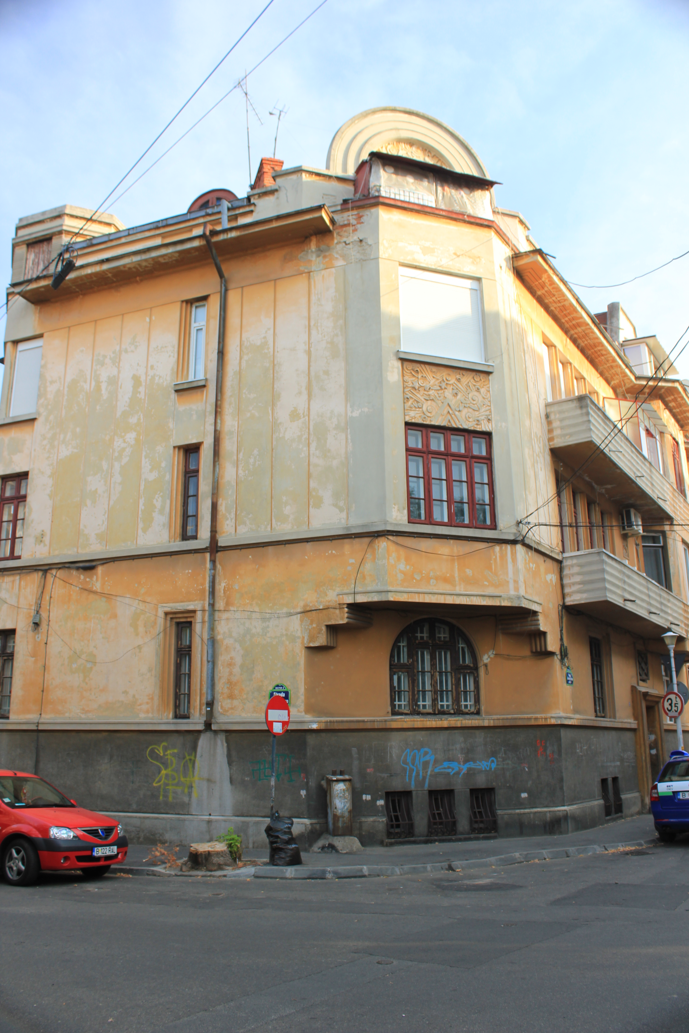 Casă Kiritescu Constantin 10-12